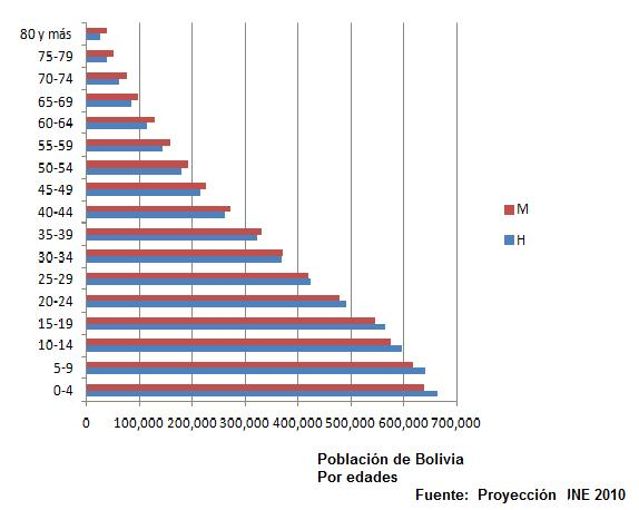 Pirámide de la población, según la proyección oficial del INE para el período 2005 - 2010. Se han tomado los valores del 2010.